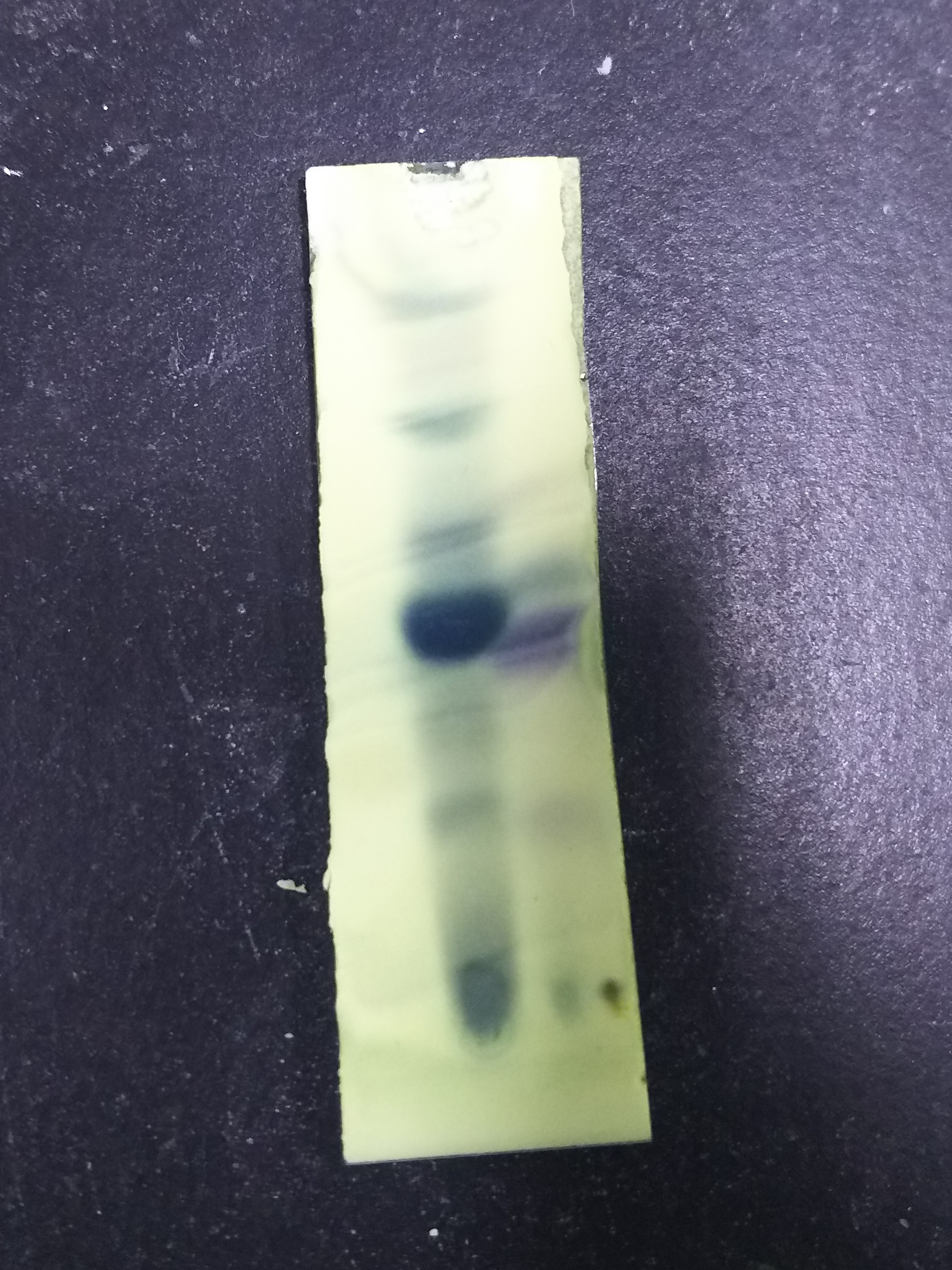 リンモリブデン酸によりスポットが検出されたTLCプレート